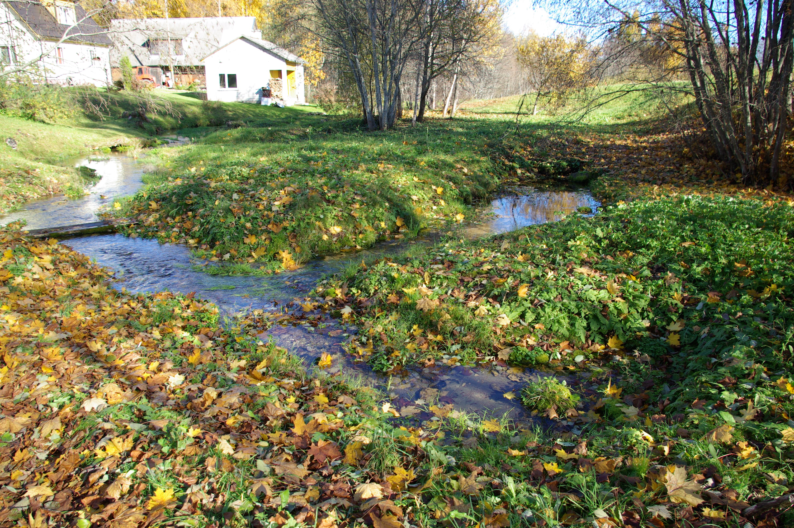 Ojaotsa allikad